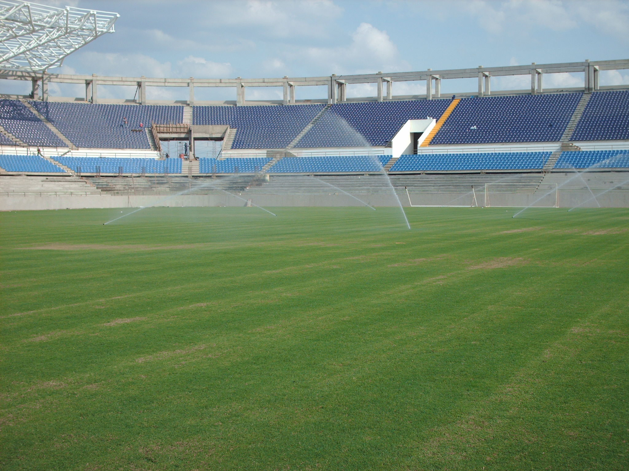 Estadio Monumental de Maturín Mayo 2007